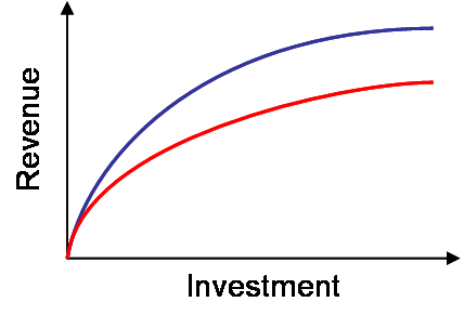 Revenue per investment